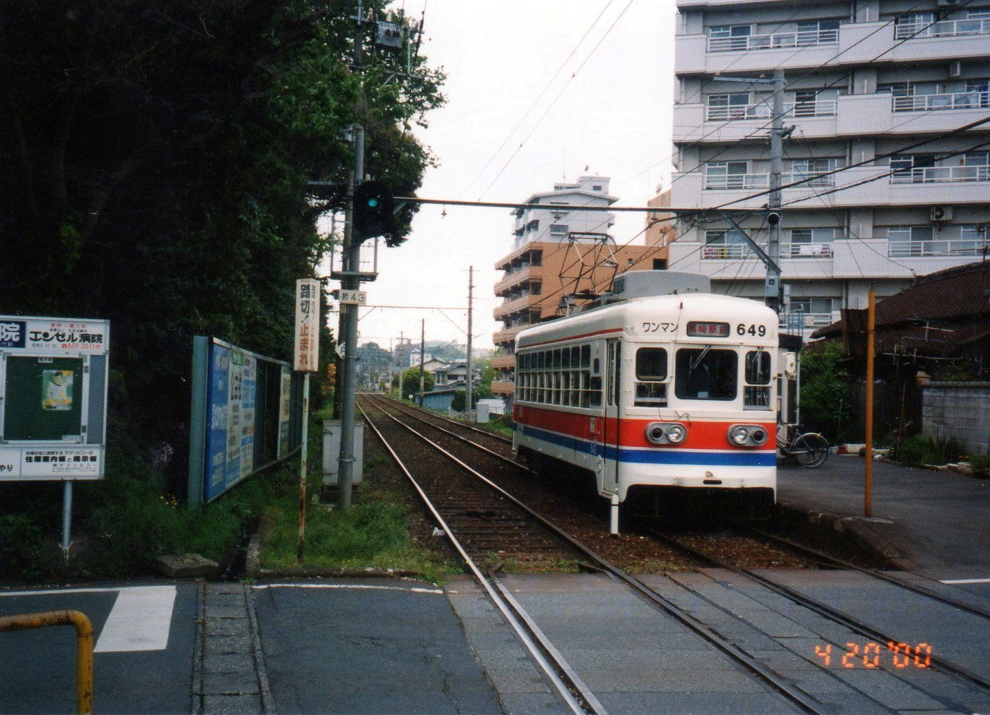 西鉄北九州線 折尾東口停留場